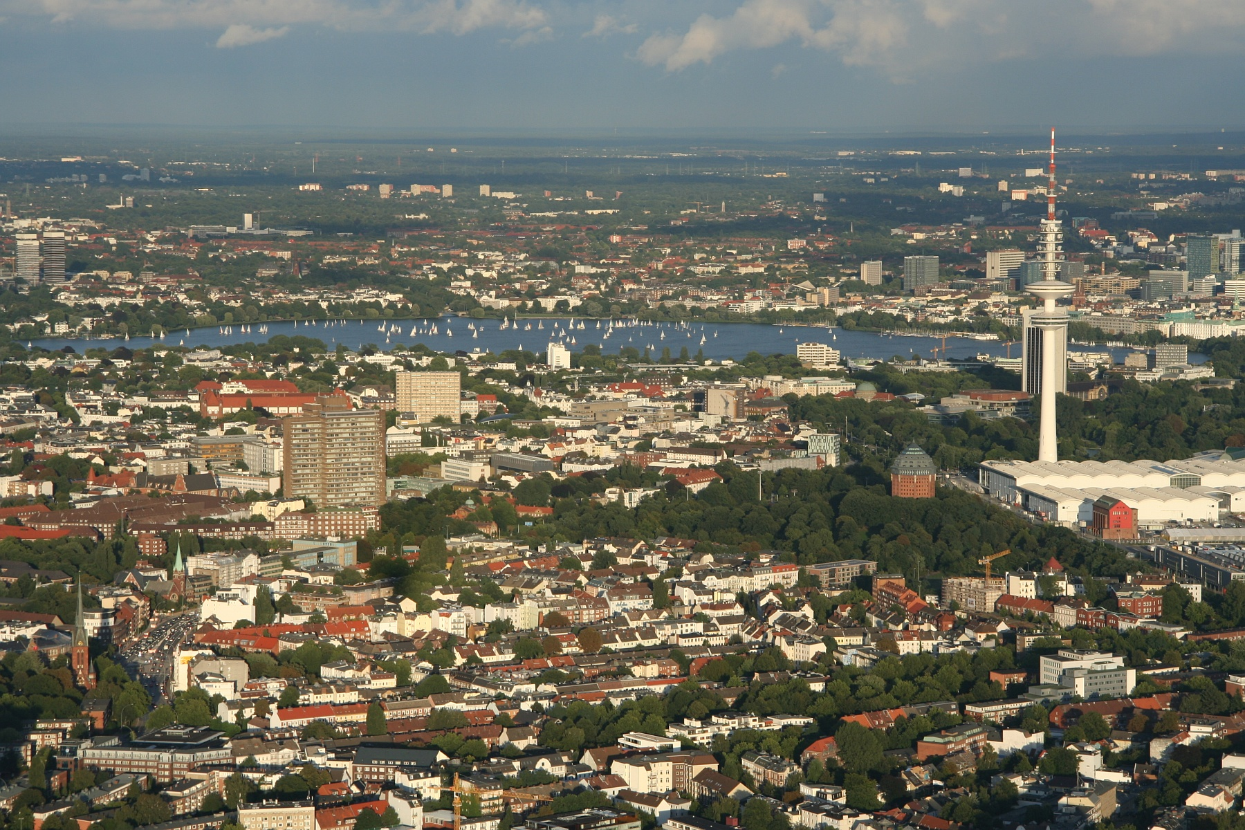 Im Vordergrund: Schanzenviertel, Messehallen (rechts im Bild), Heinrich-Hertz-Turm, in der Bildmitte: Rotherbaum, Außenalster